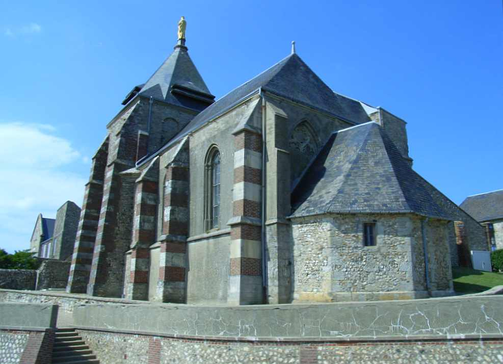 Chapelle Notre-Dame de Salut, Fécamp, France